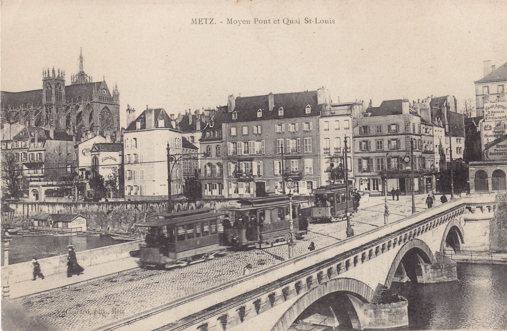 Carte postale ancienne éditée par Conrard à Metz : METZ - Moyen Pont et Quai St-Louis